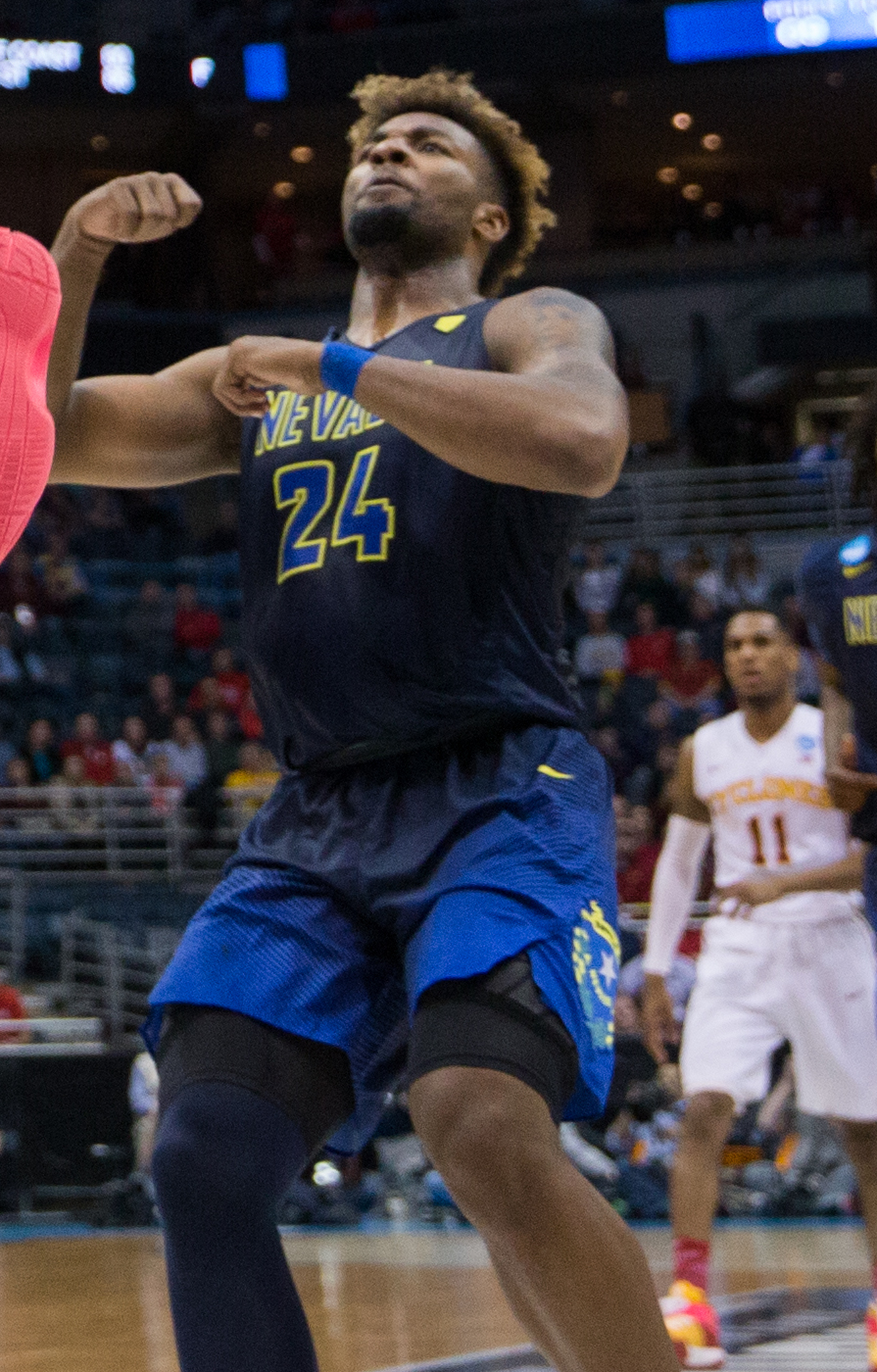 ISU vs Nevada